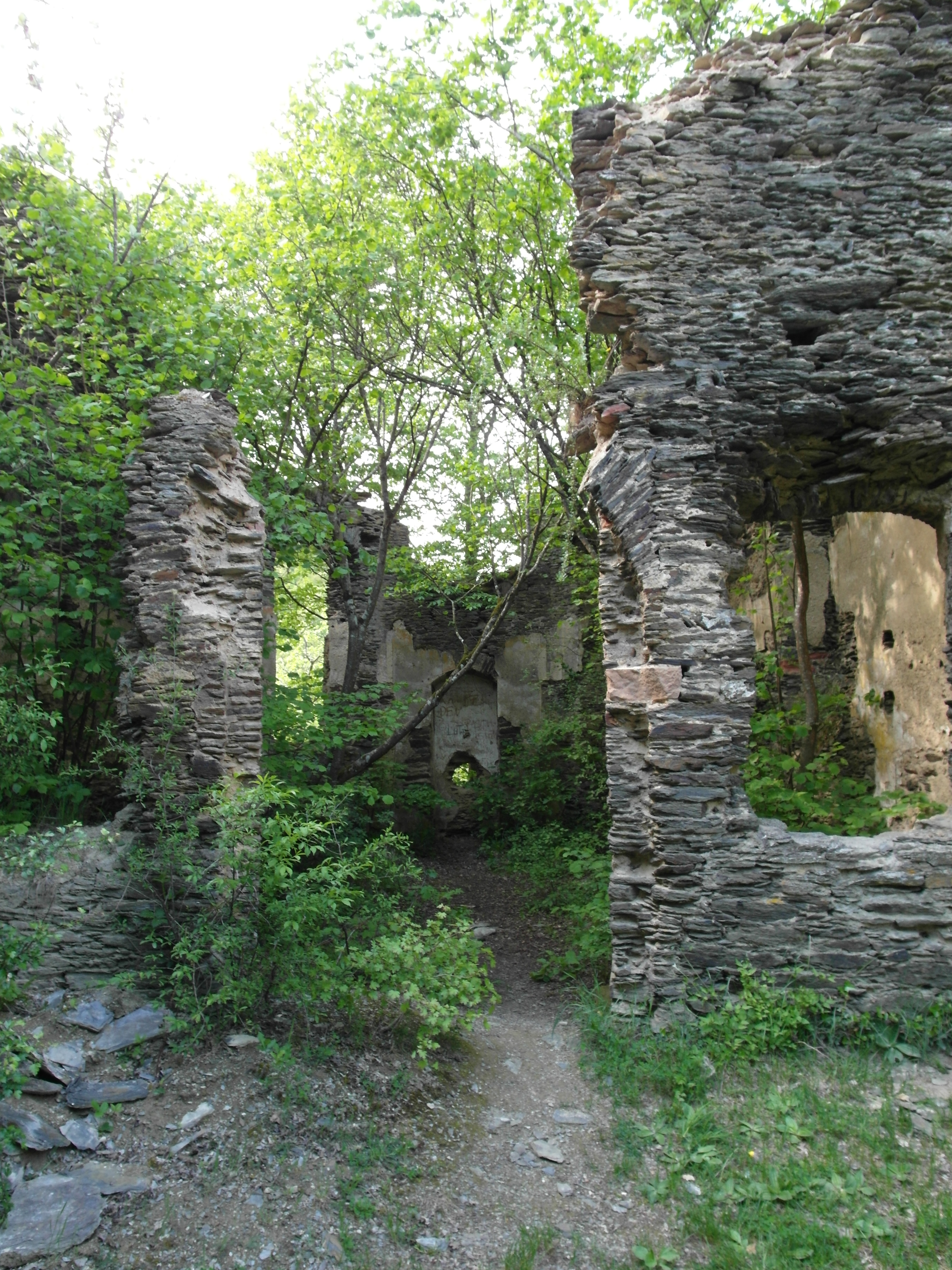 Burg Waldeck (Hunsrück); Unterburg; Ruine der Schlosskapelle